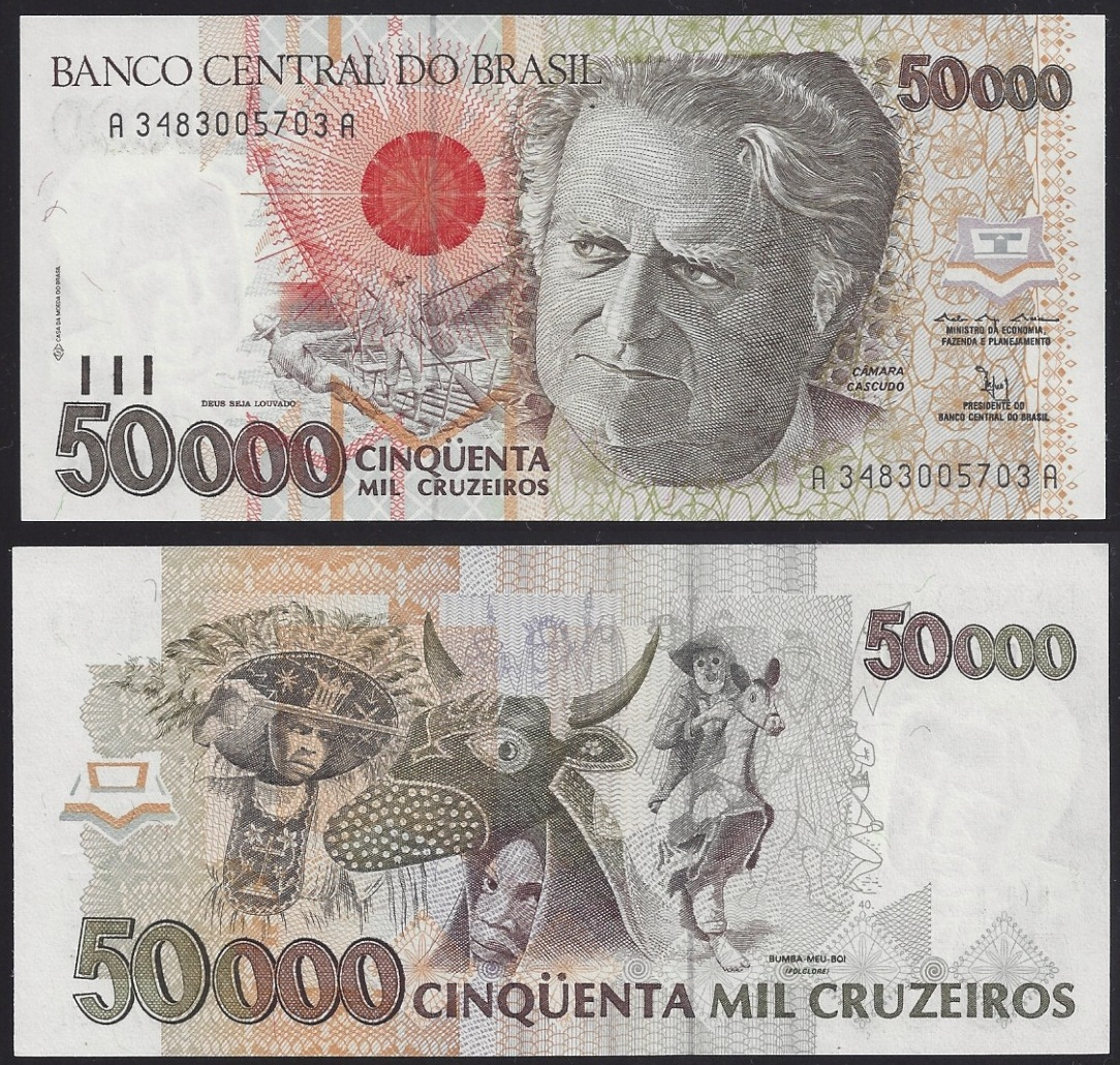 Cédula de 50000 cruzeiros com a efígie de Câmara Cascudo.